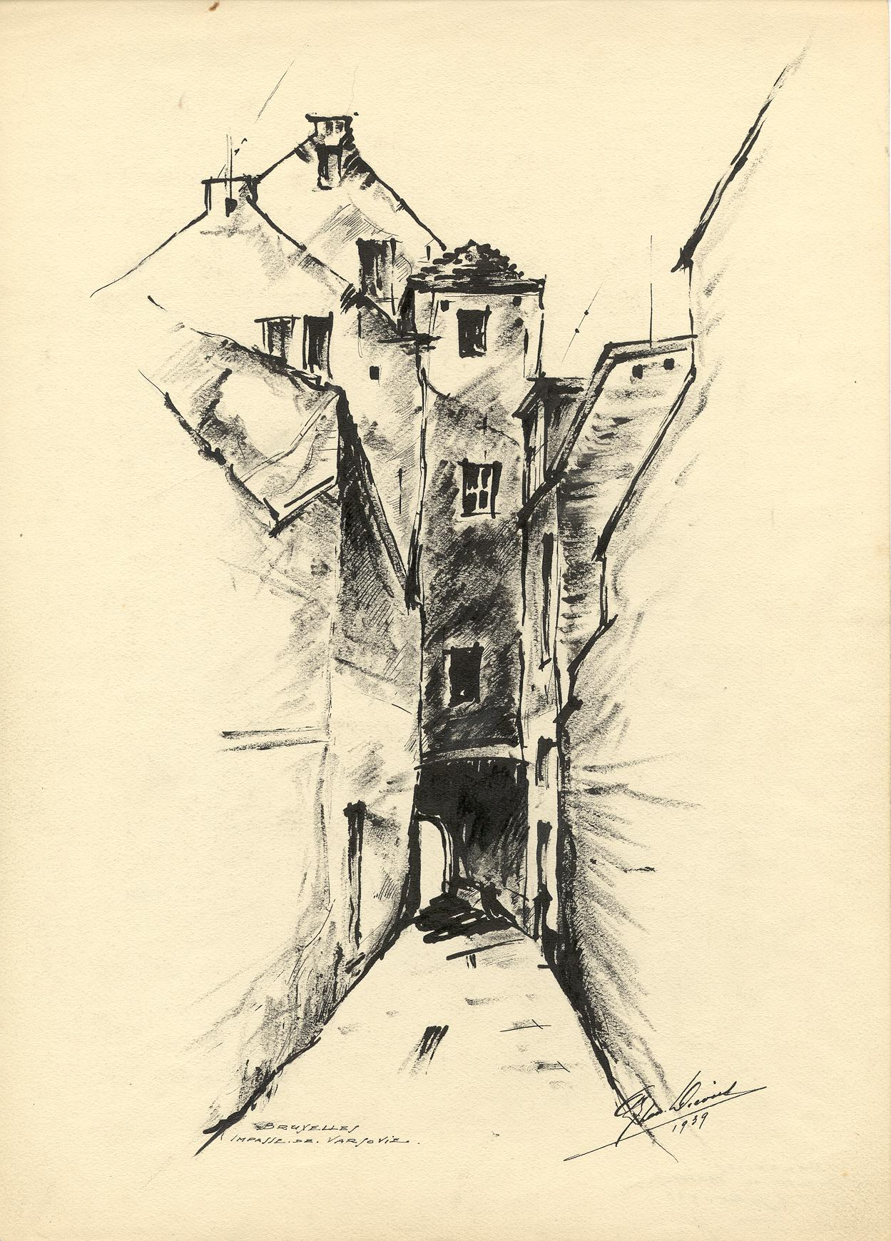 Vue de l'Impasse de Varsovie à Bruxelles, rue Haute, quartier des Marolles, dessin à l'encre de Chine par Léon van Dievoet, le 10 juillet 1939.